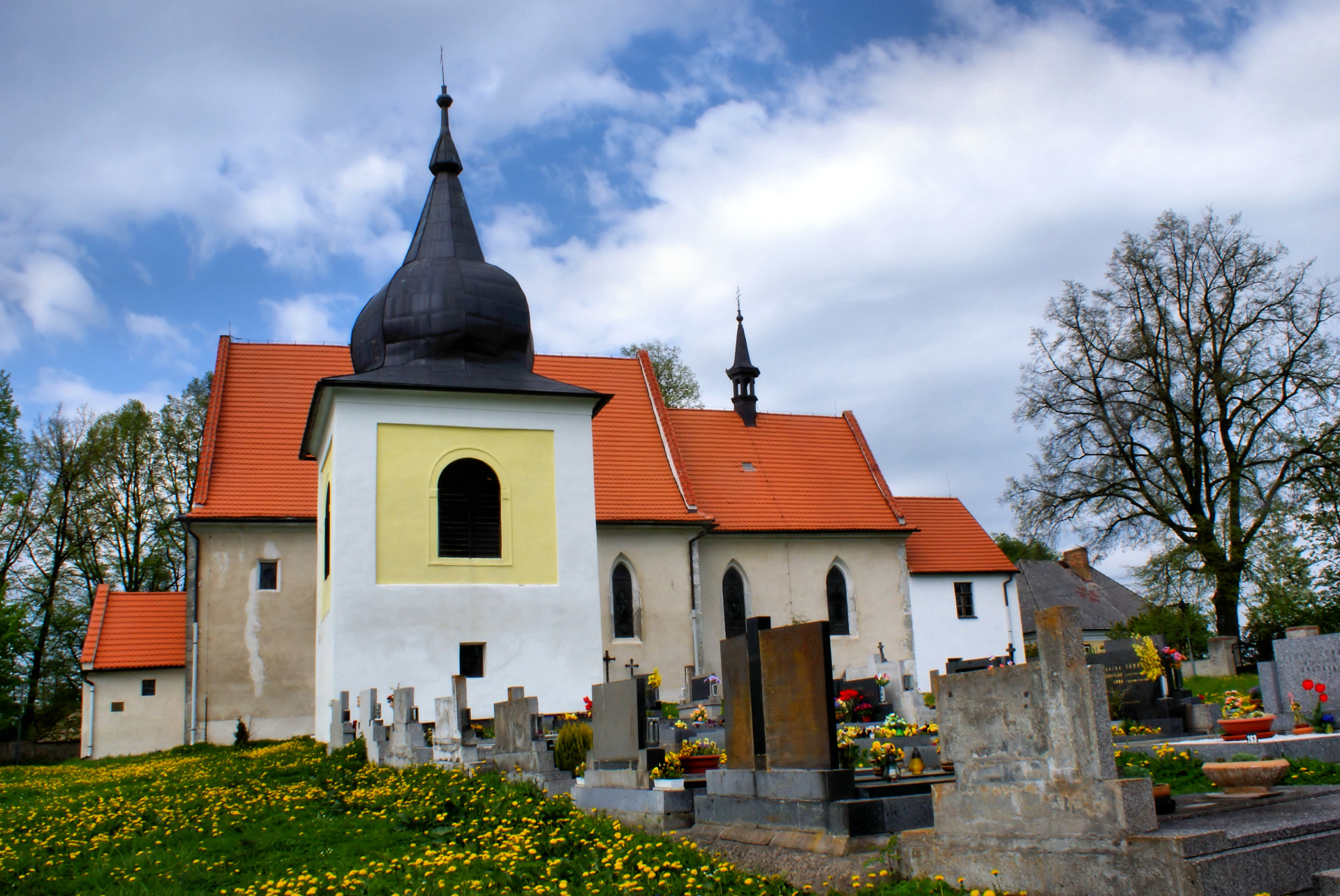 Kostel svatého Prokopa a Navštívení Panny Marie, Hvožďany.